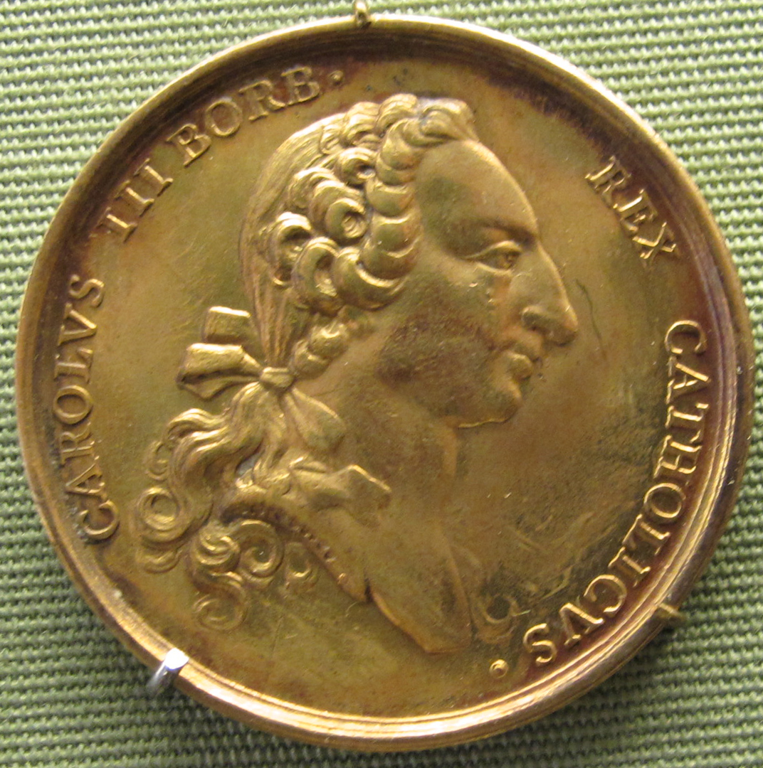 Tomás francisco prieto, carlo III, oro, 1759